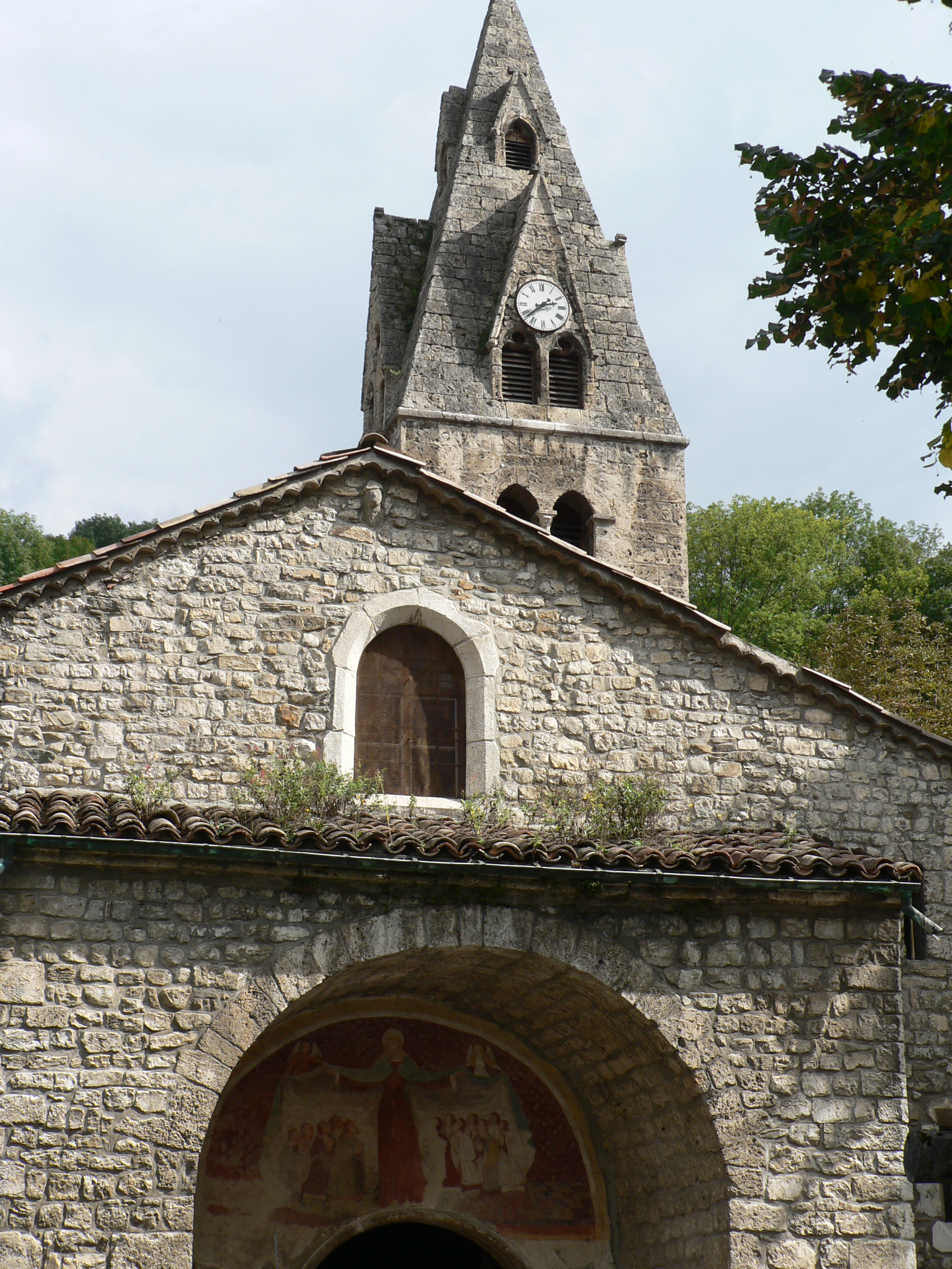 Eglise de Genevrey de Vif .